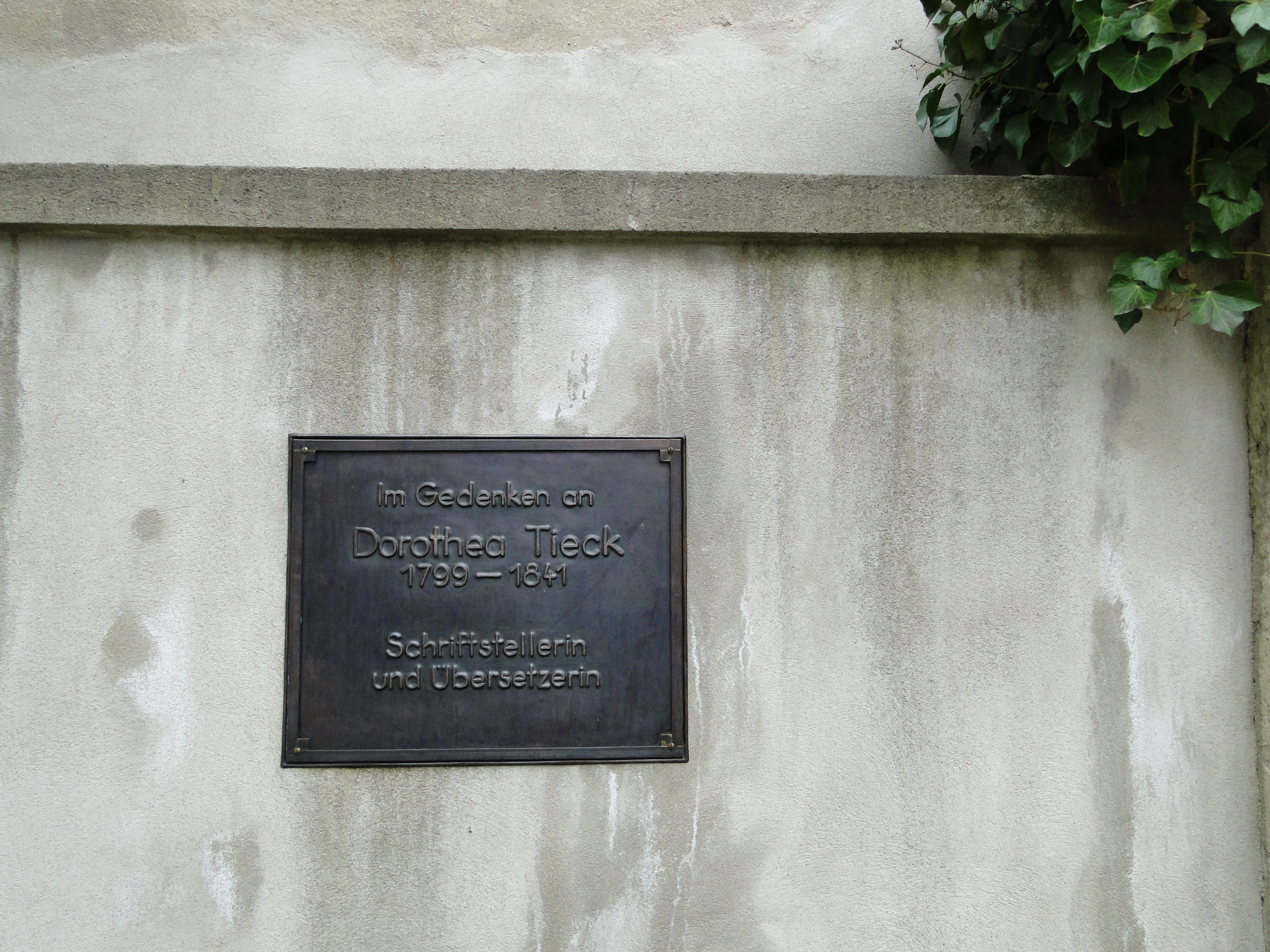 Gedenktafel für Dorothea Tieck auf dem Alten Katholischen Friedhof in Dresden. Tieck wurde auf diesem Friedhof beerdigt, ihr Grab ist jedoch nicht erhalten.